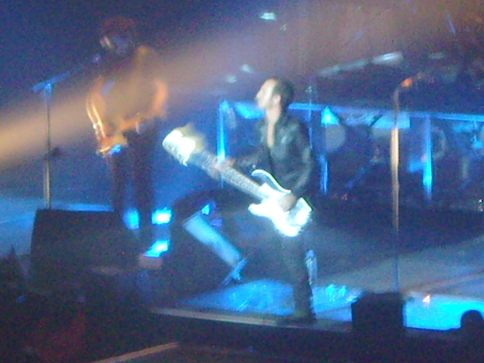 Calogéro en concert à Clermont ferrand 2007